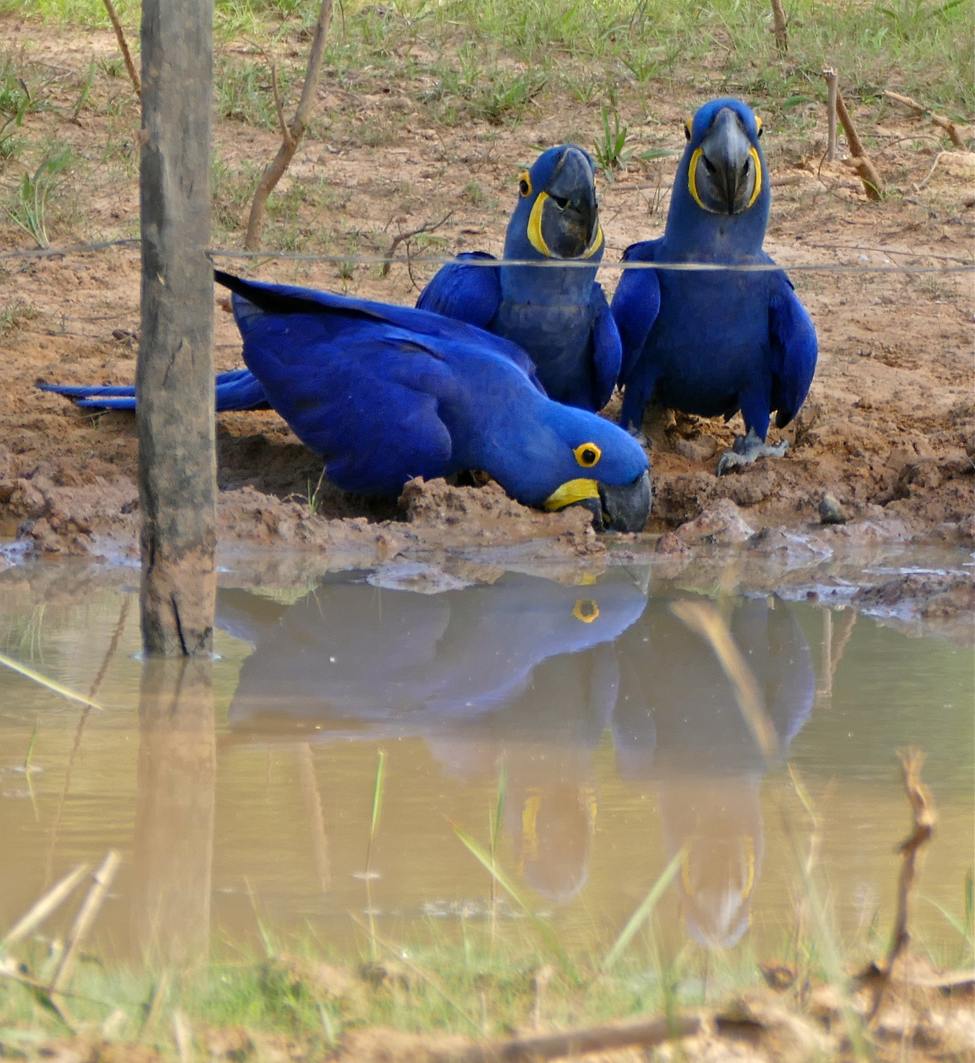 Transpantaneira, Poconé, Mato Grosso, BRAZIL